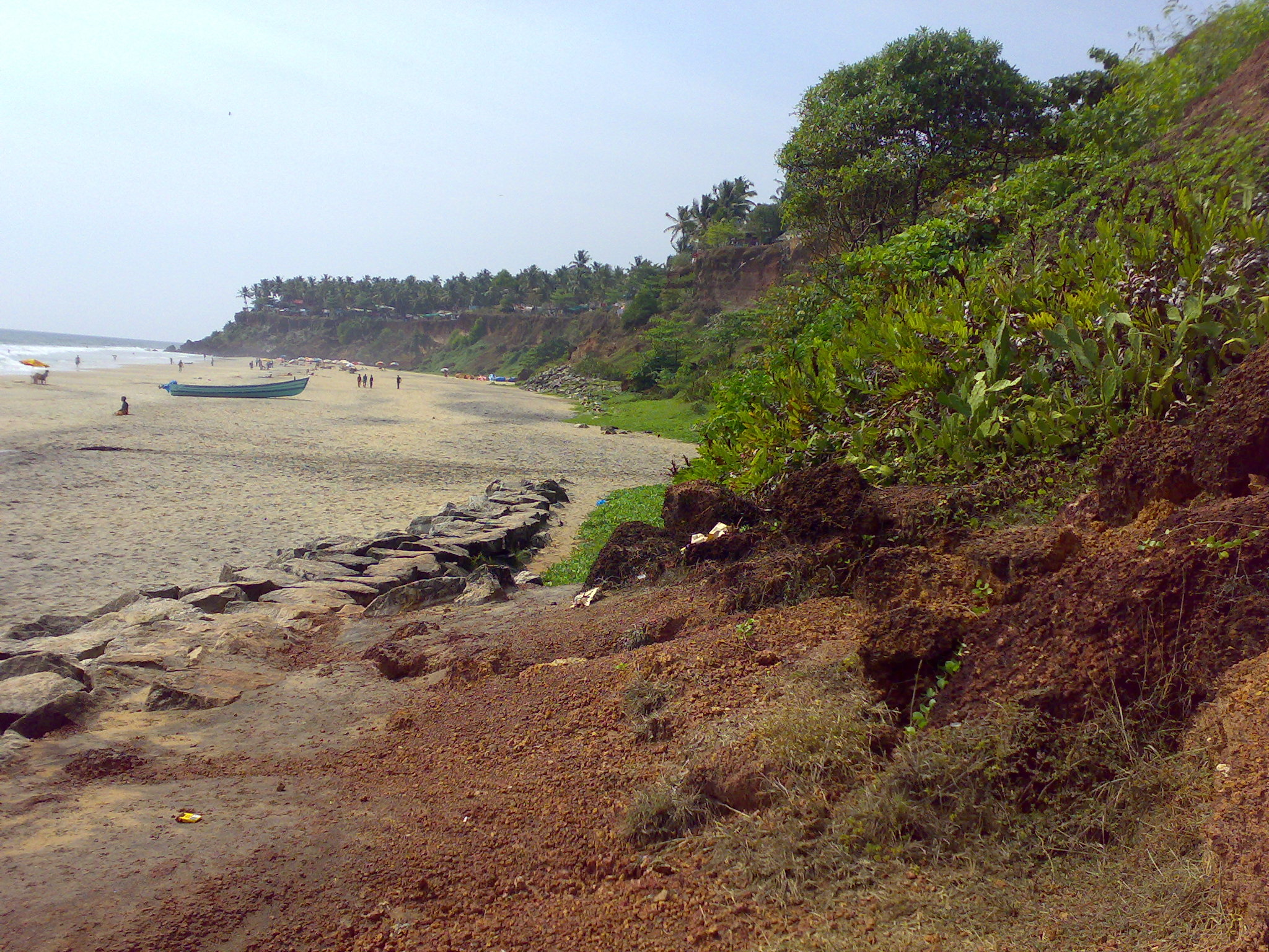 കുന്നുകൾ (ക്ലിഫ്ഫുകൾ)